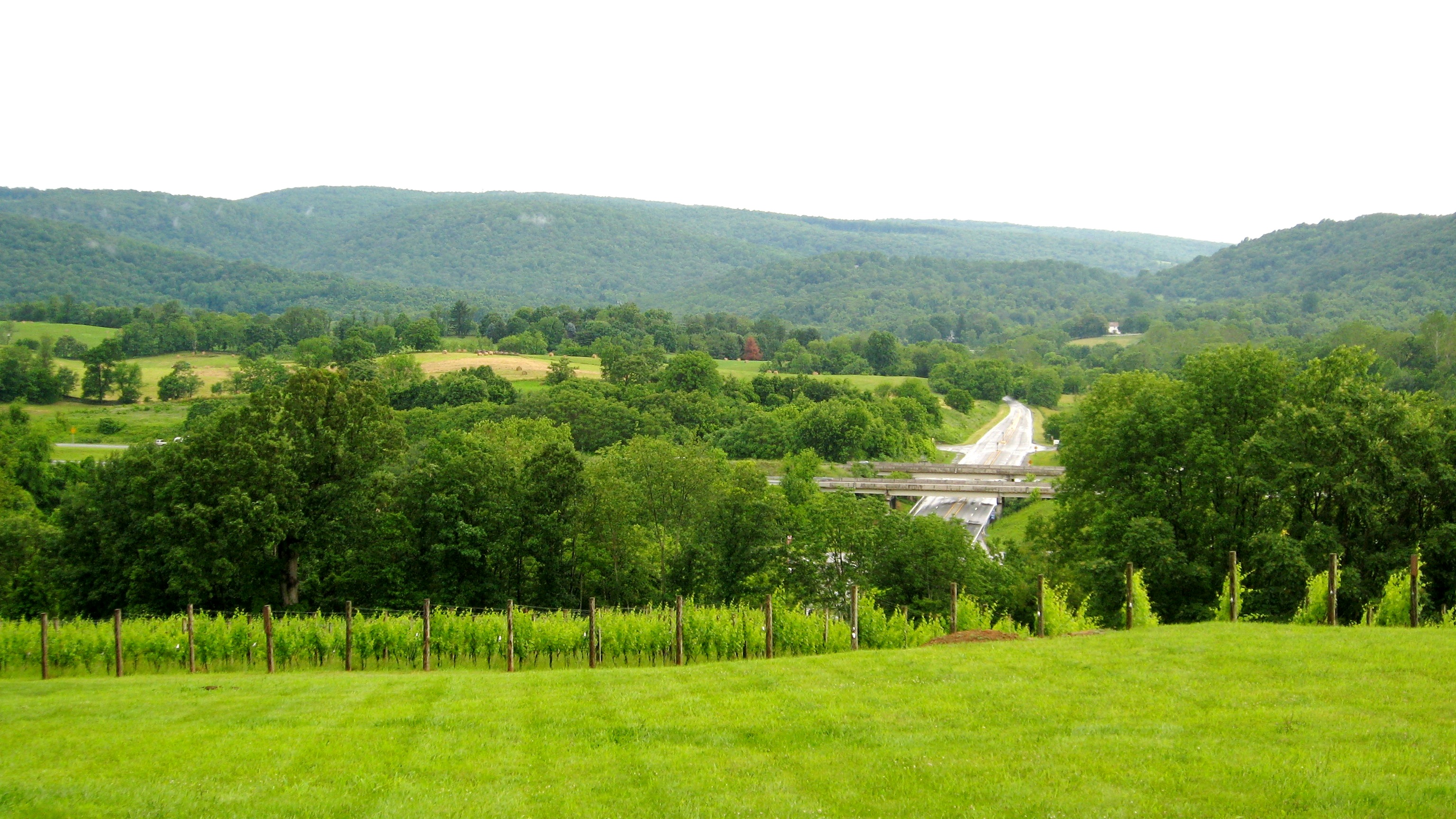 Markham, Virginia